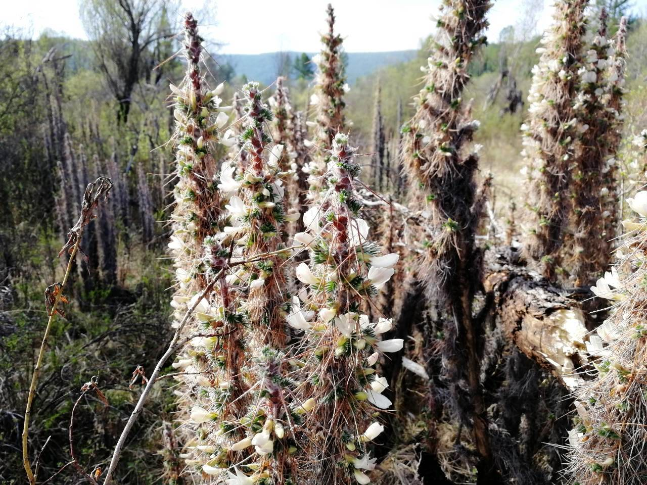 Flowering caragana (camel's tail) in the south of Buryatia, Russia